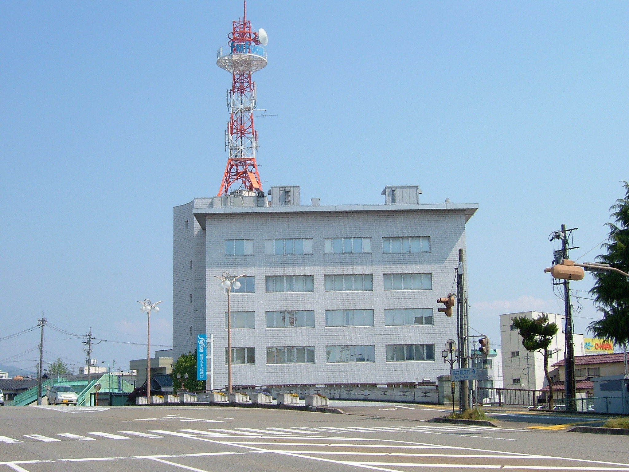 福井エフエム放送本社ビル（福井県福井市）